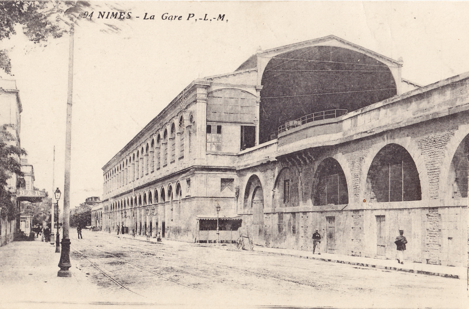 Carte postale ancienne sans mention d'éditeur, n°94 :NÎMES - La Gare P.-L.-M.